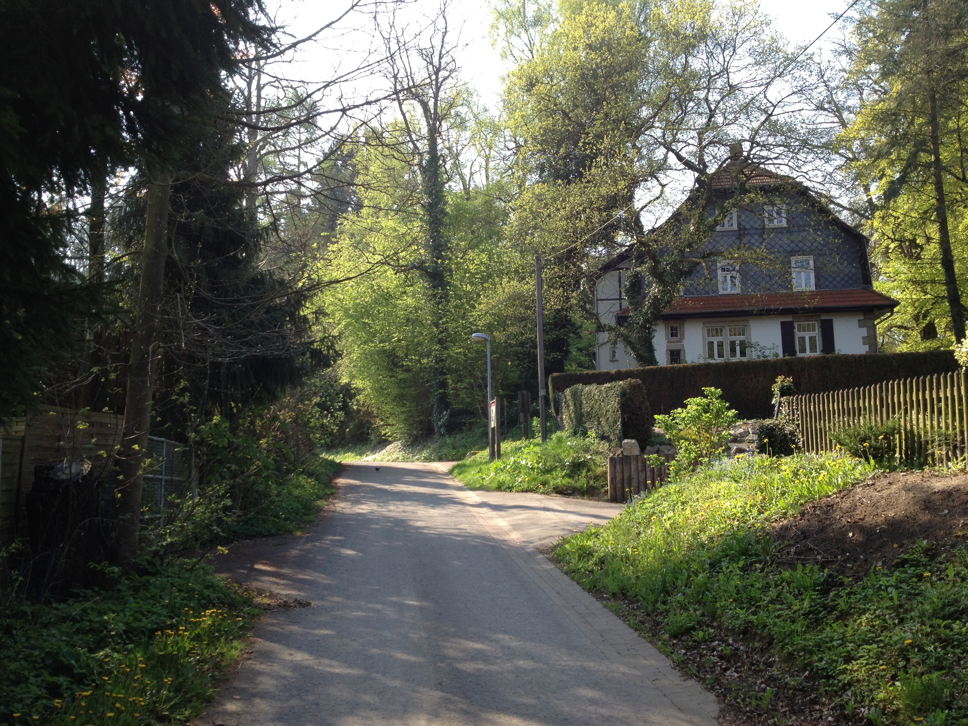 Der Eco Pfad Kulturgeschichte Ahlberg-Mariendorf auf der Straße "Am Ahlberg" kurz vor der Station Steigerhaus